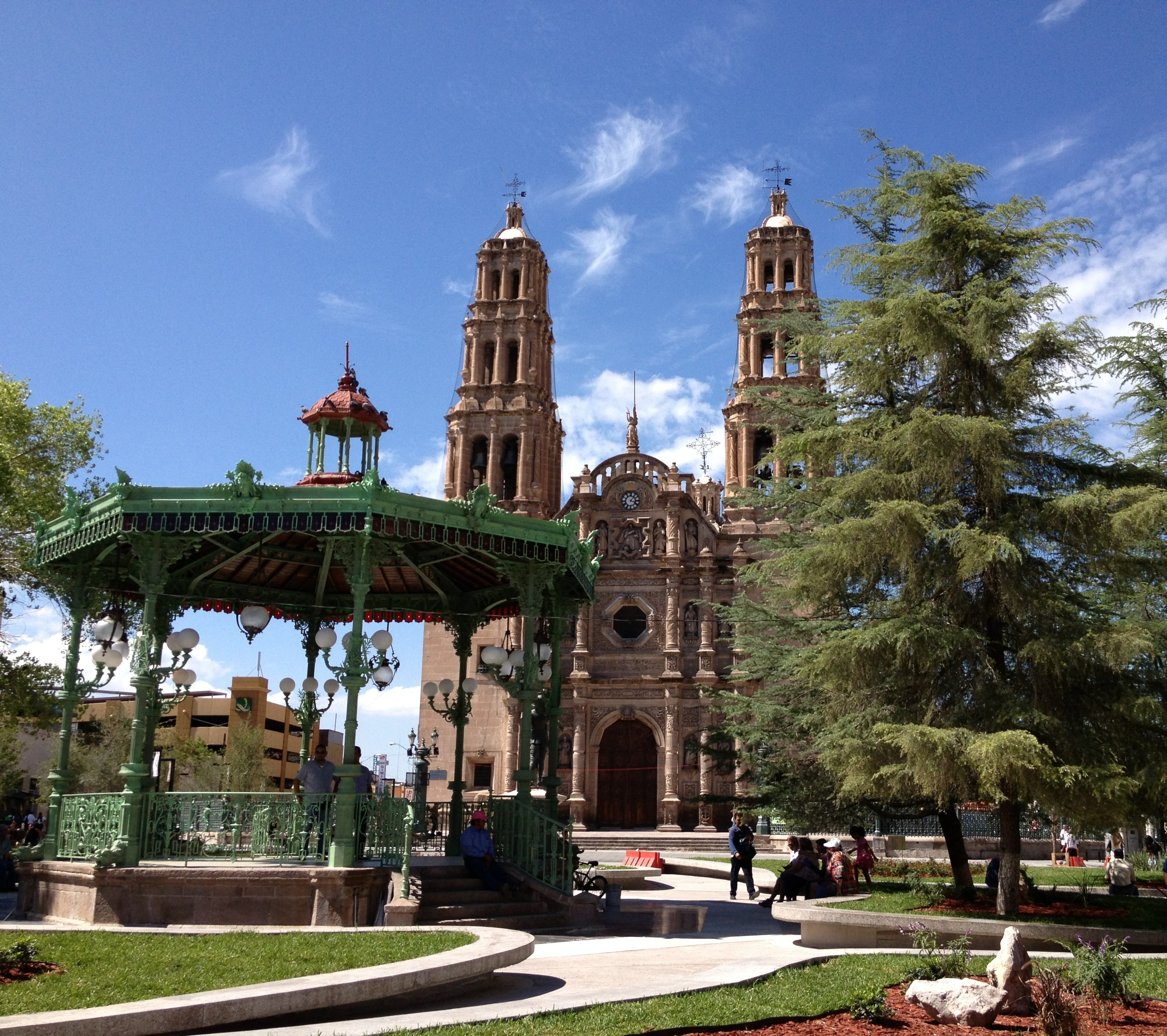 La Catedral de Chihuahua y el kiosko de la Plaza de Armas